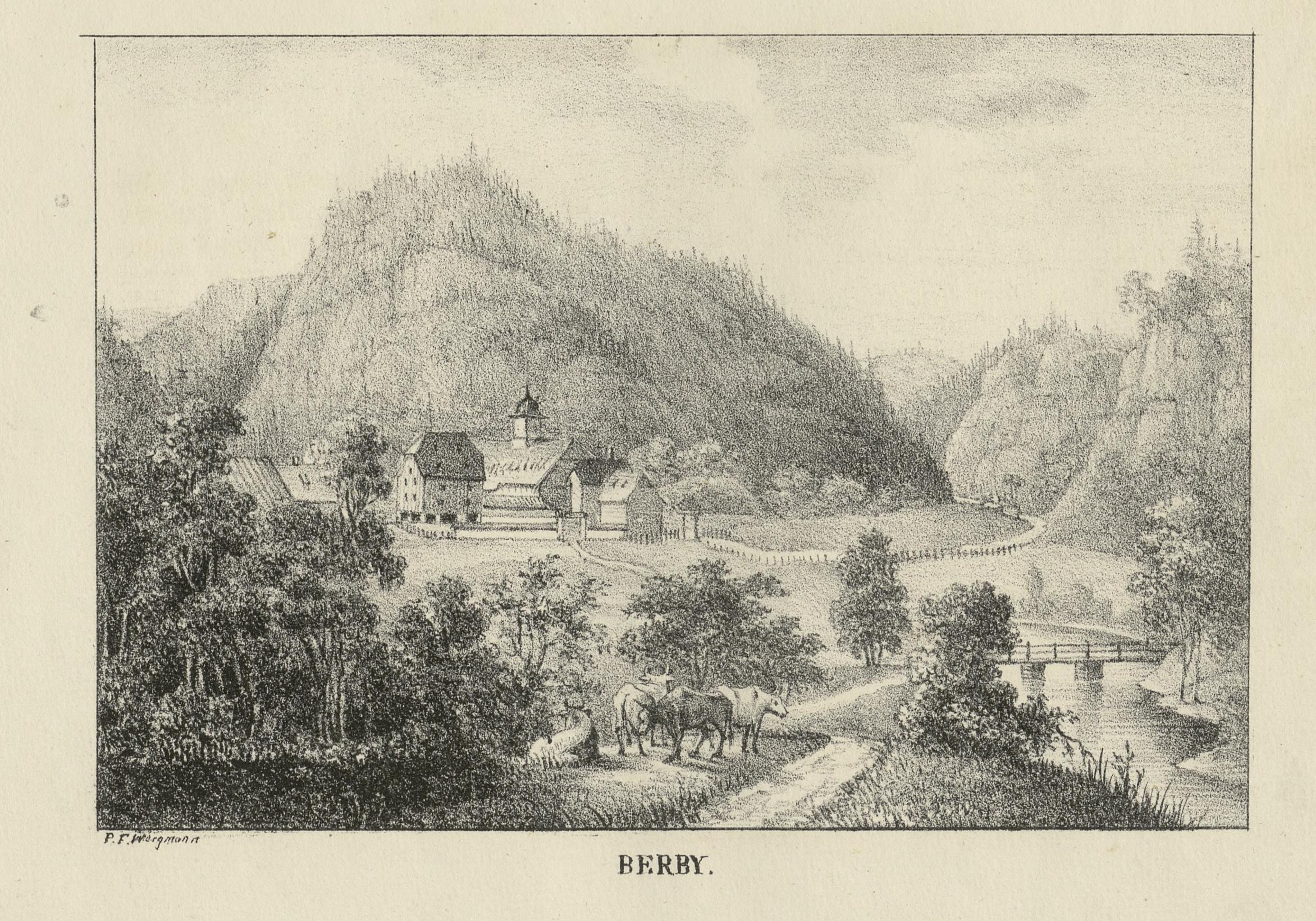 Illustrasjon hentet fra boken "Norge, fremstillet i lithographerede Billeder efter Naturen" av Wergmann, P.F. og utgitt av P.F. Wergmann (Christiania, 1836-1837)